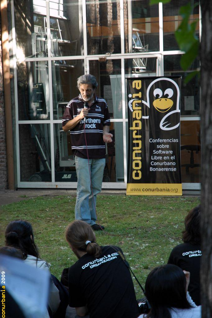 Enrique Chaparro